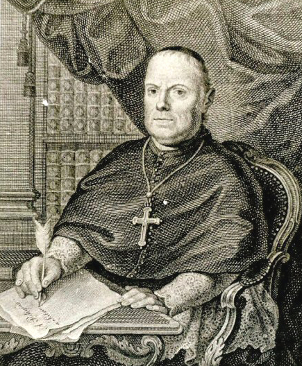 José Joaquim da Cunha Azeredo Coutinho, bispo e político.